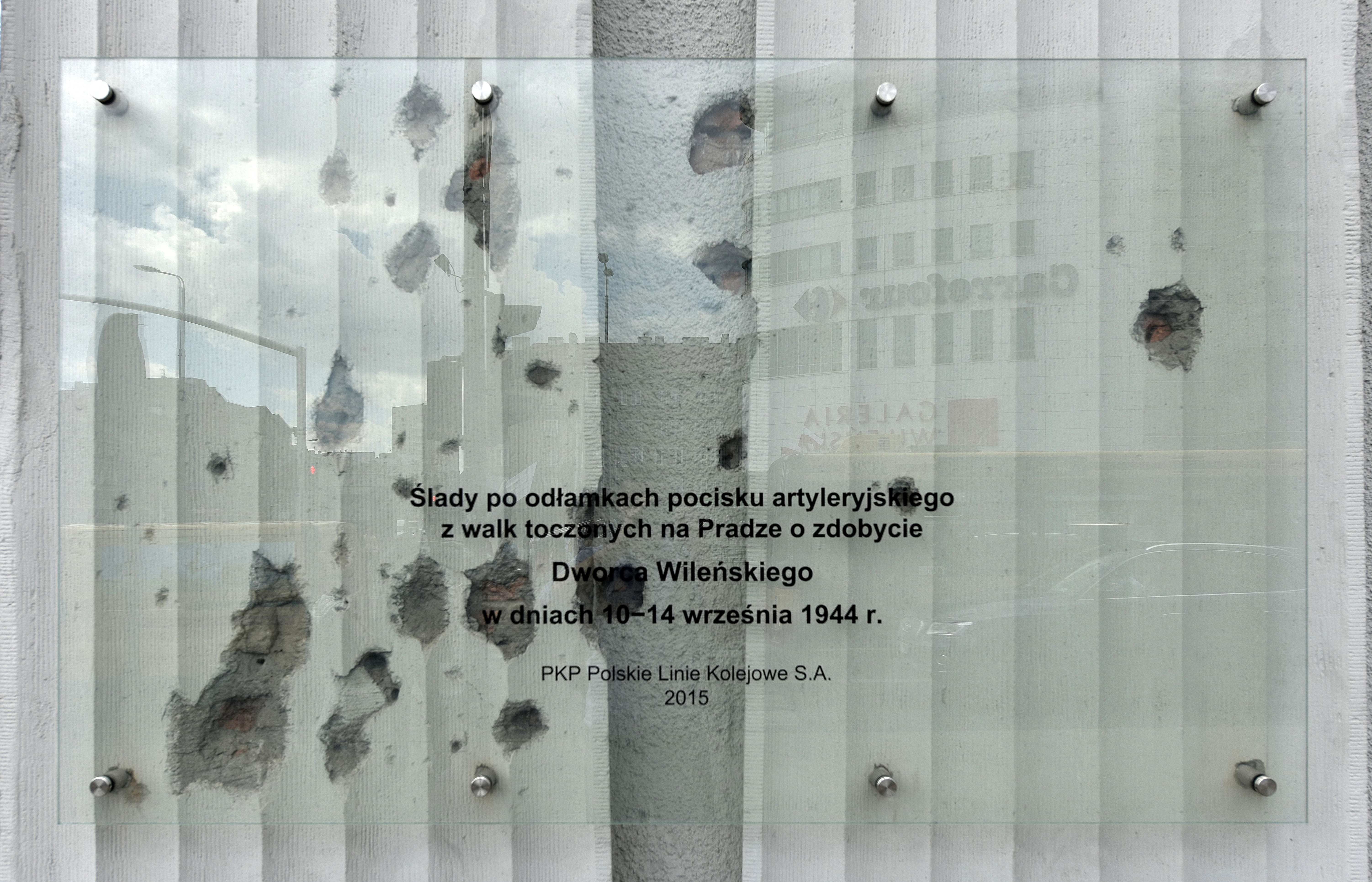 Tablica chroniąca ślady po pocisku artyleryjskim na gmachu Dyrekcji PKP przy ul. Targowej 74 (od strony alei „Solidarności”)